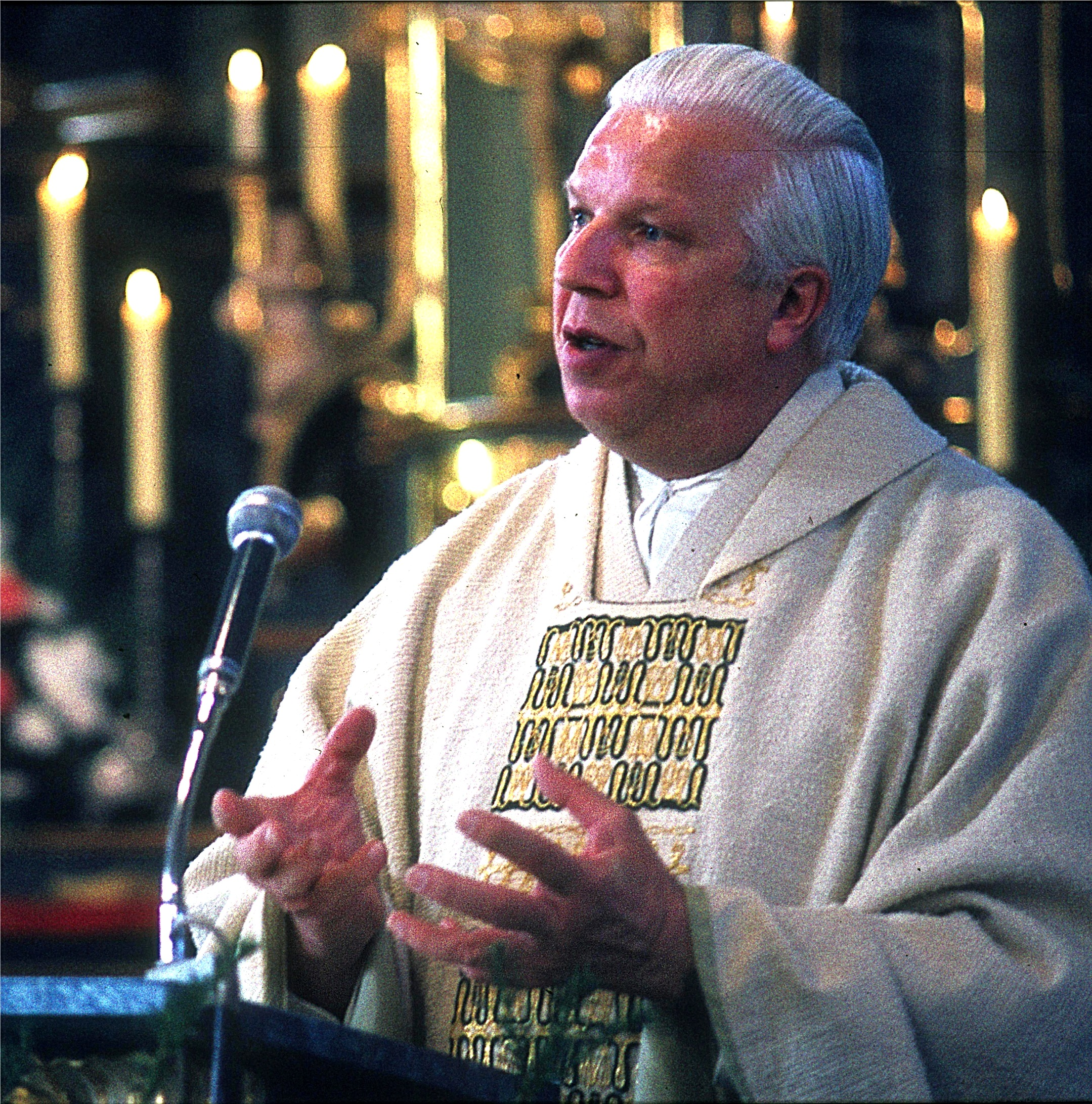 Heinrich Festing bei einer Predigt in einem Gottesdienst des Kolpingwerks Bezirksverband Weißenthurm in der Pfarrkirche von Urmitz (Rhein).